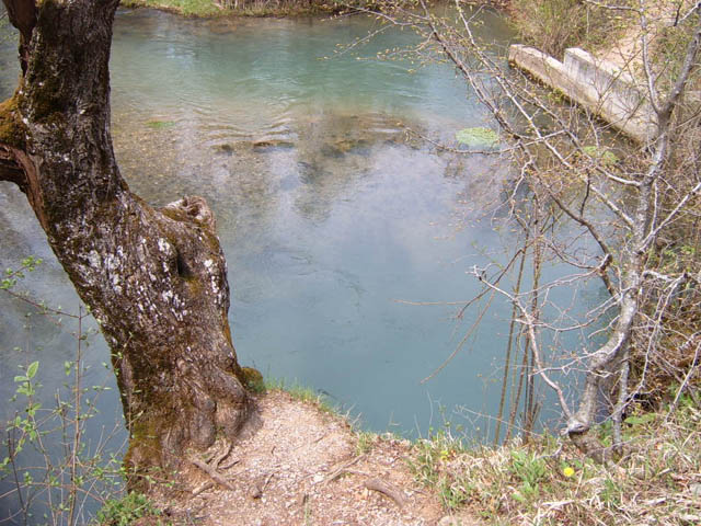 Јеловачко врело на Старој планини